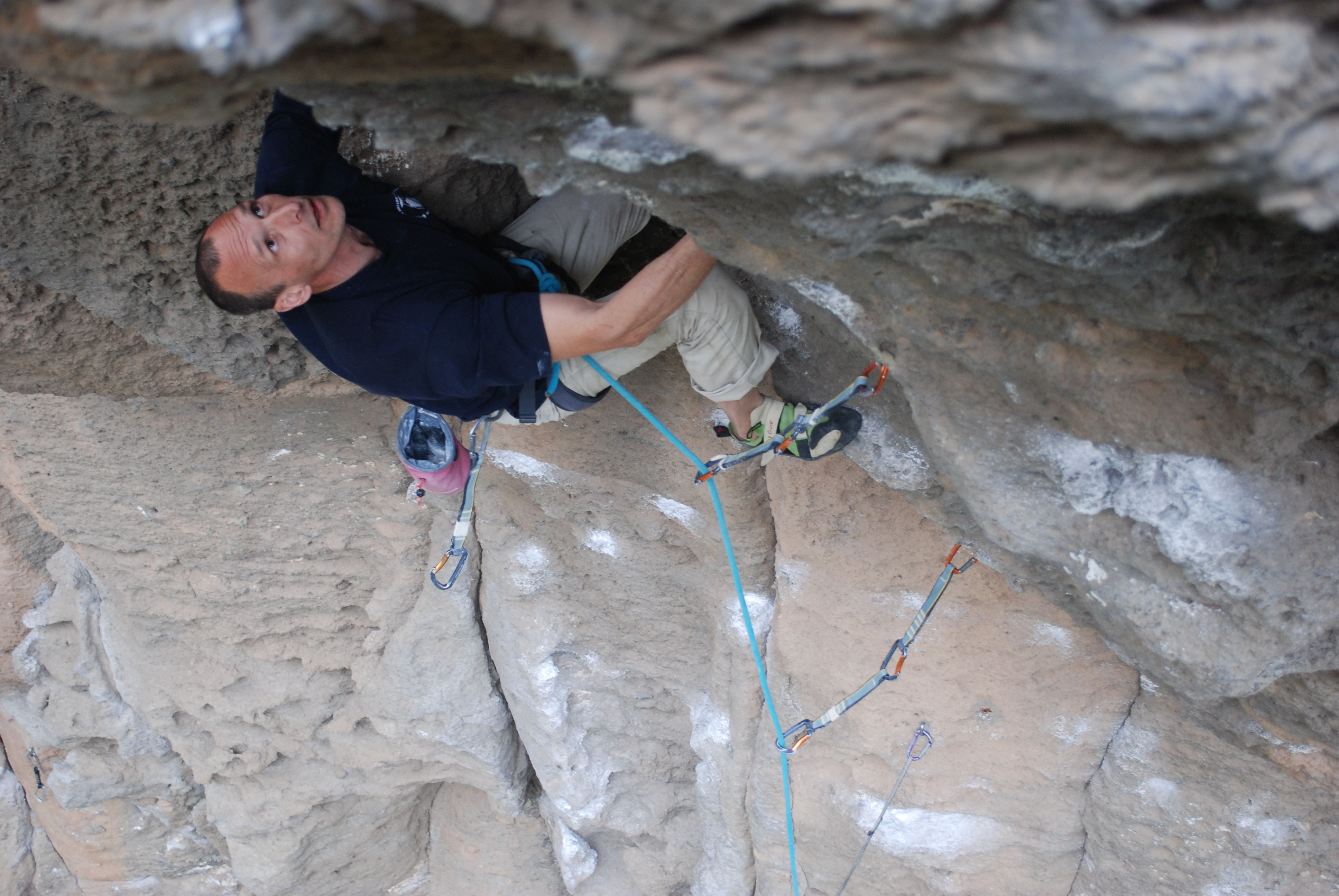 Катерене по спортен маршрут.